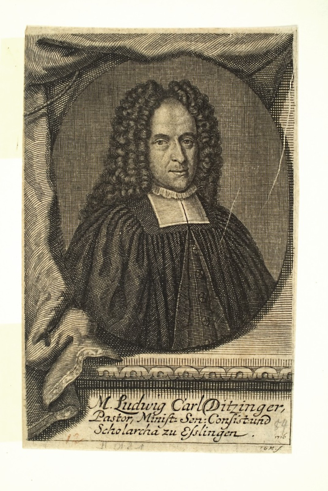 Ludwig Carl Ditzinger, Kupferstich, 9,2 x 14,2 cm